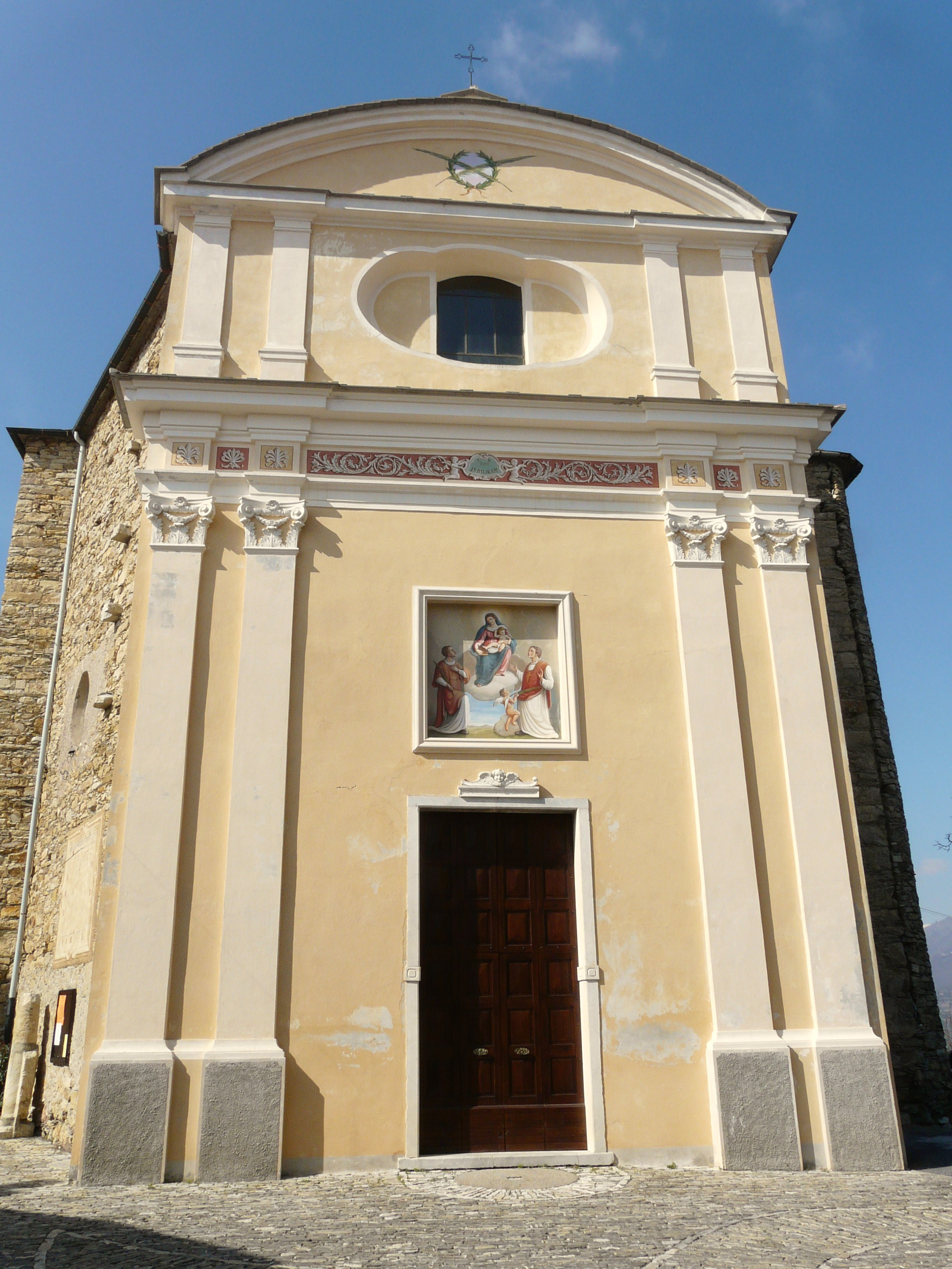 Chiesa di Sant'Antonino, Liguria, Italia